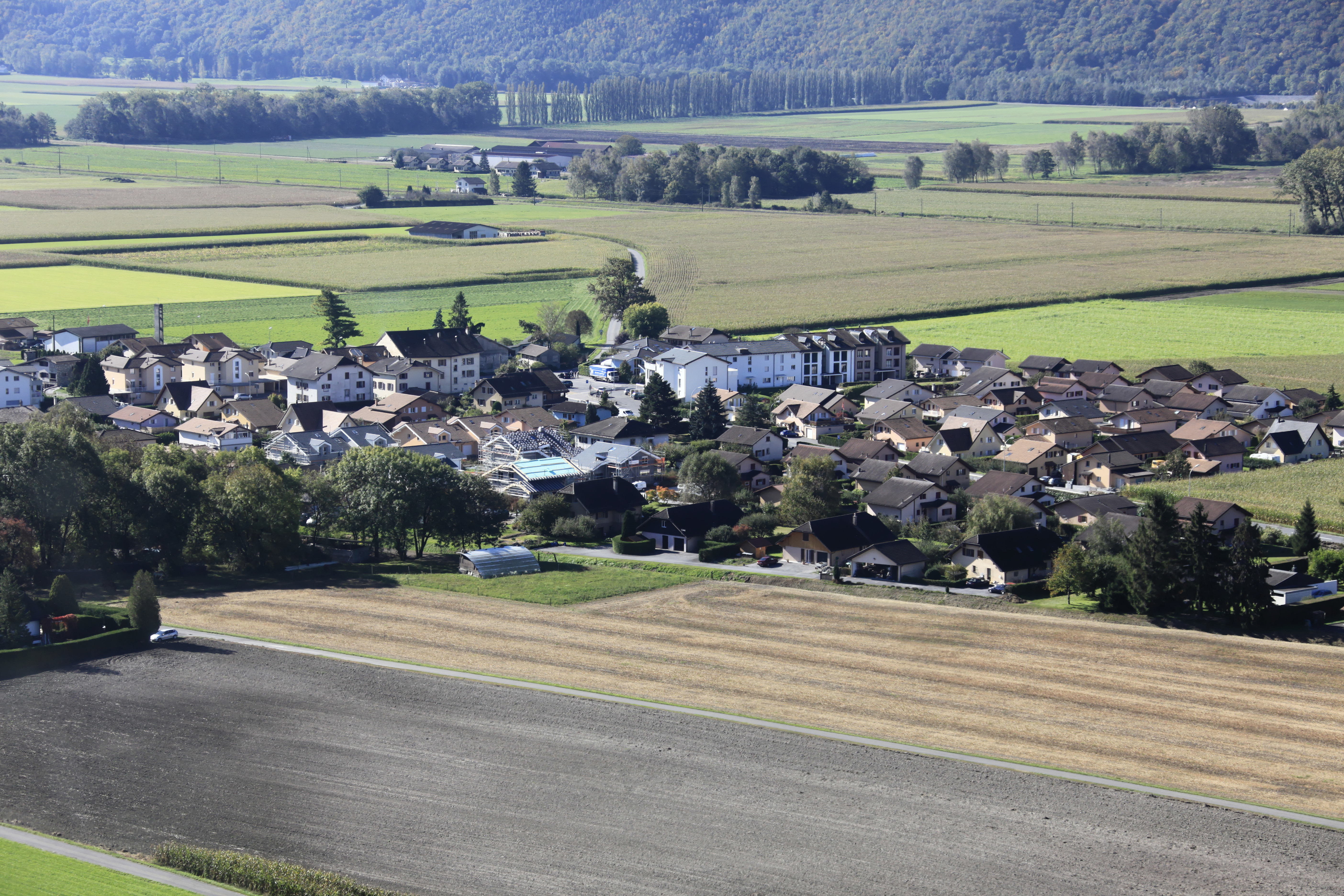 Vue aérienne du village d'Illarsaz